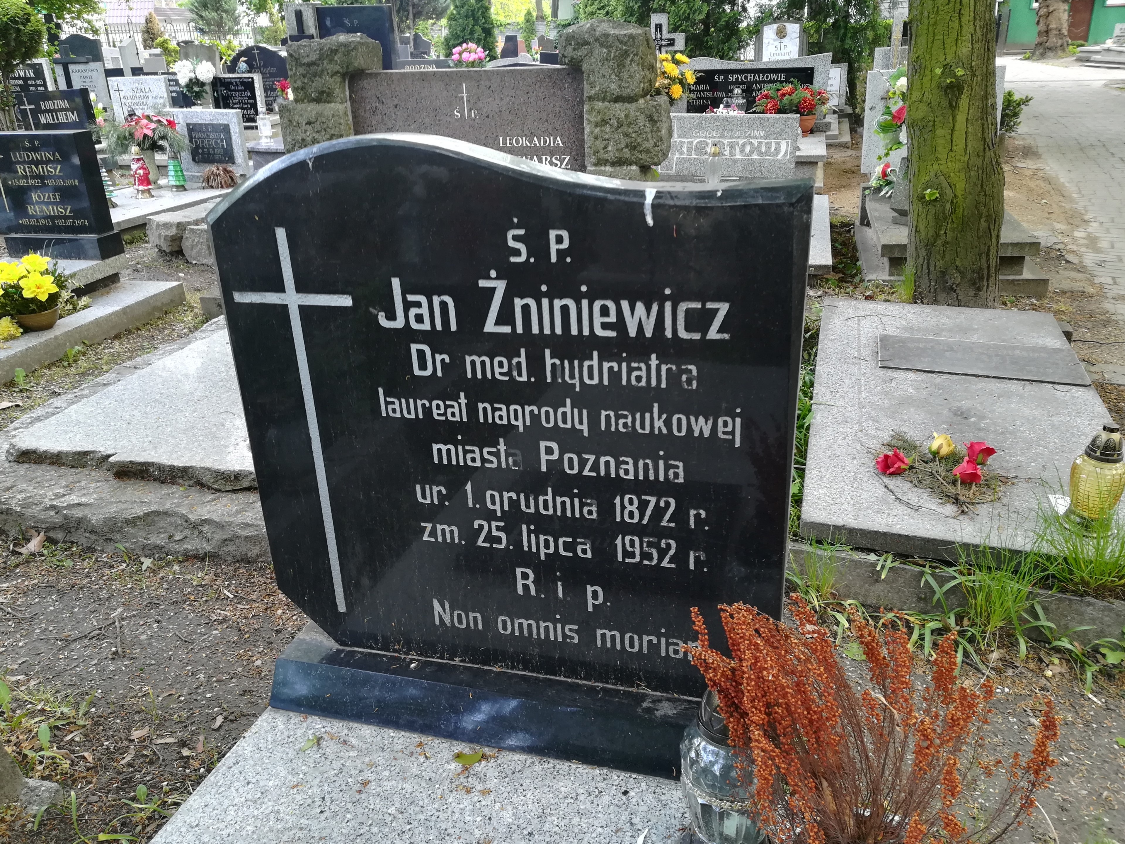 Jan Żniniewicz - cm. górczyński, Poznań.